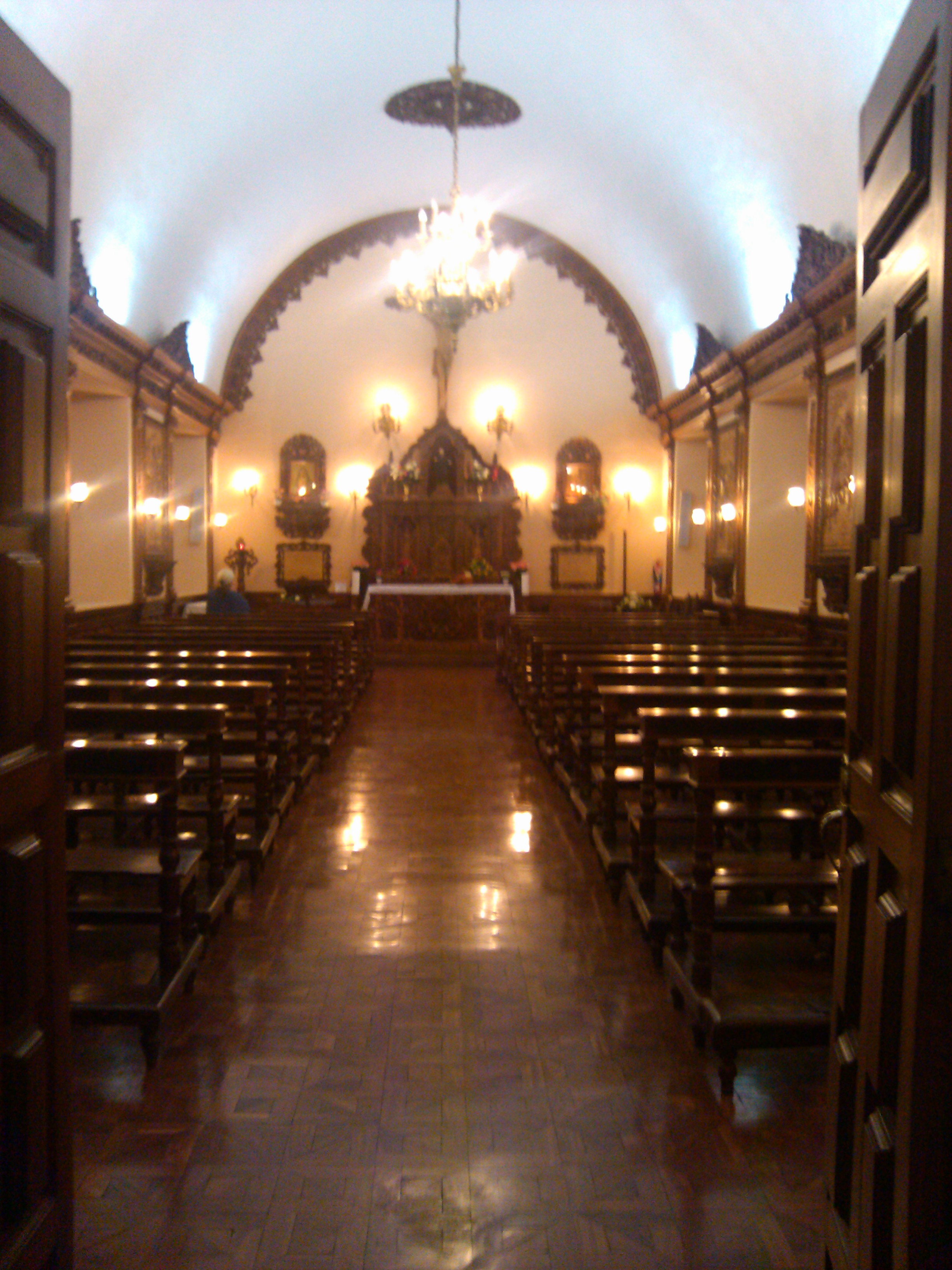 Capilla donde sucedió el milagro de la virgen Dolorosa, del Colegio San Gabriel. Antiguo comedor del colegio, parte del complejo del Convento de La Compañía de Jesús (Quito, Ecuador).